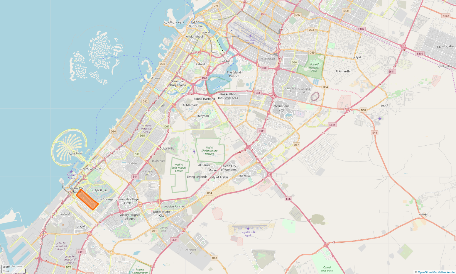 Der Ortsteil Jumeirah Islands in Dubai This map may be incomplete, and may contain errors. Don't rely solely on it for navigation.